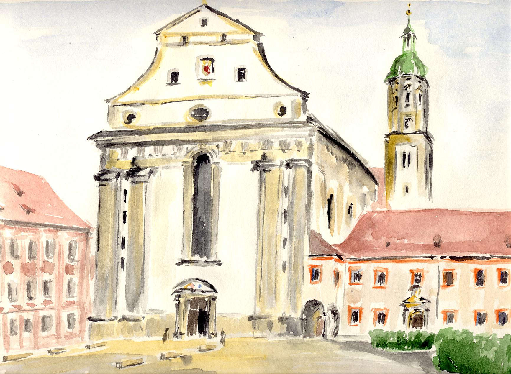 Eichstätt, Schutzengelkirche am Leonrodplatz. Aquarell von Siegfried Schieweck-Mauk, Eichstätt, 24 x 37 cm, Werk-Verz. Nr. 1006